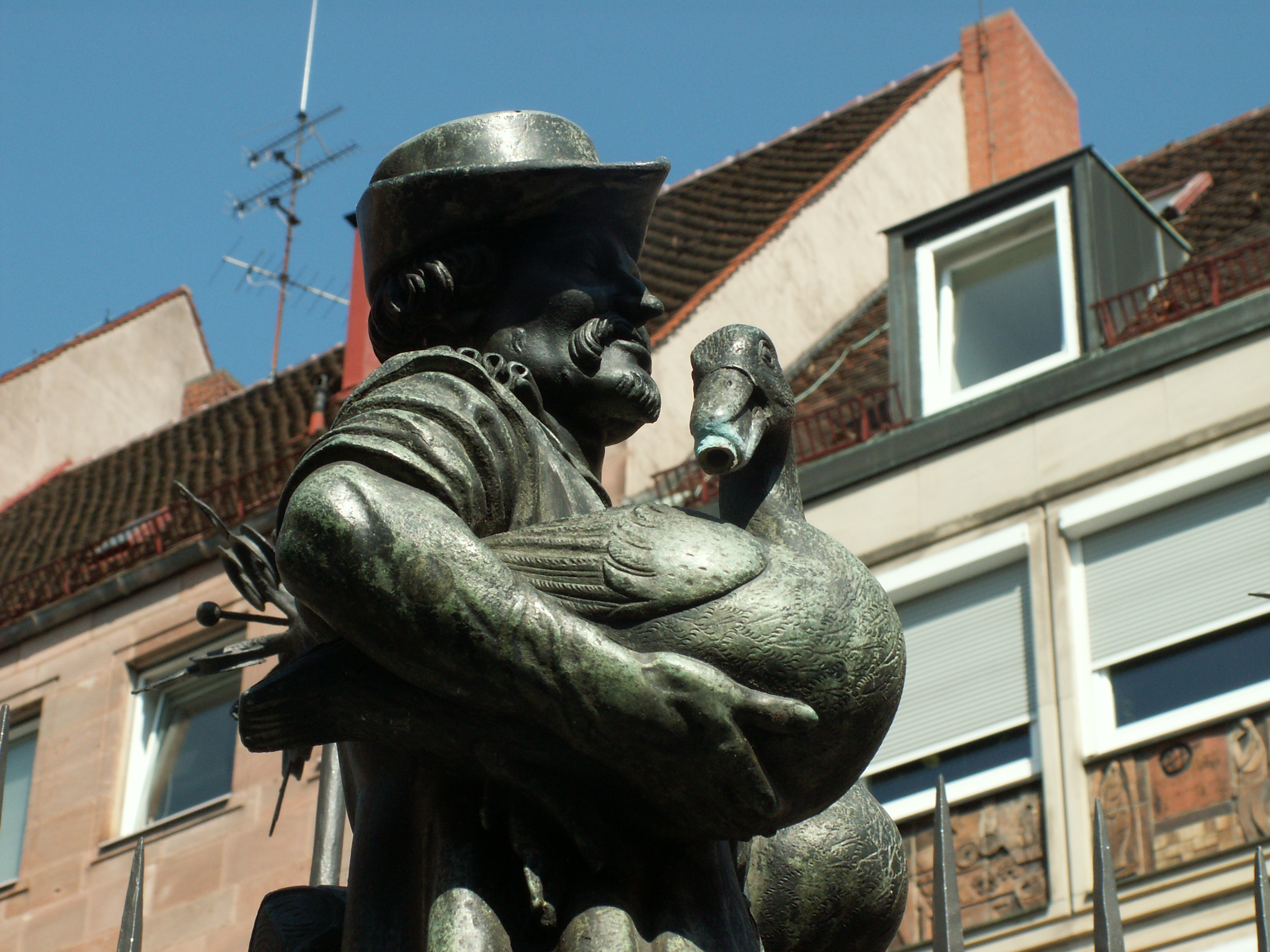 Gänsemännchenbrunnen im Hof des Nürnberger Rathauses, Bronzefigur von Pankraz Labenwolf